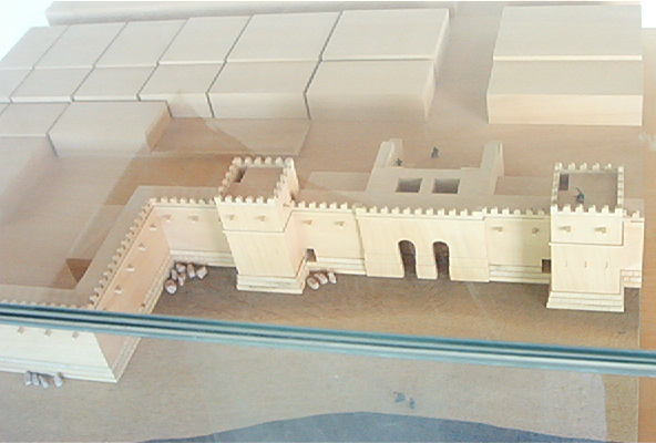 maquette de la porte de la mer dans l'antiquarium du quartier de Magon